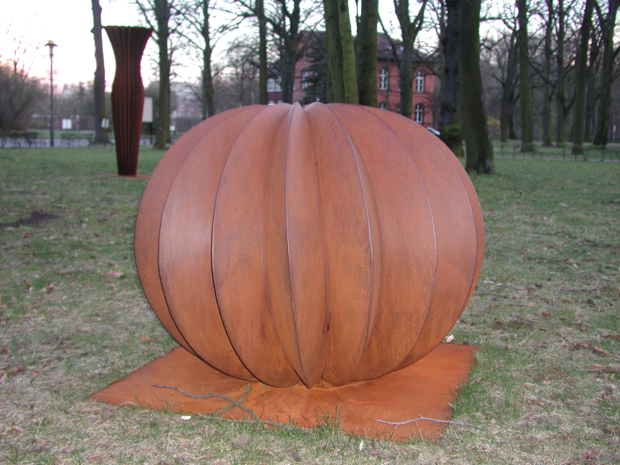 Kunst im KEH (4)